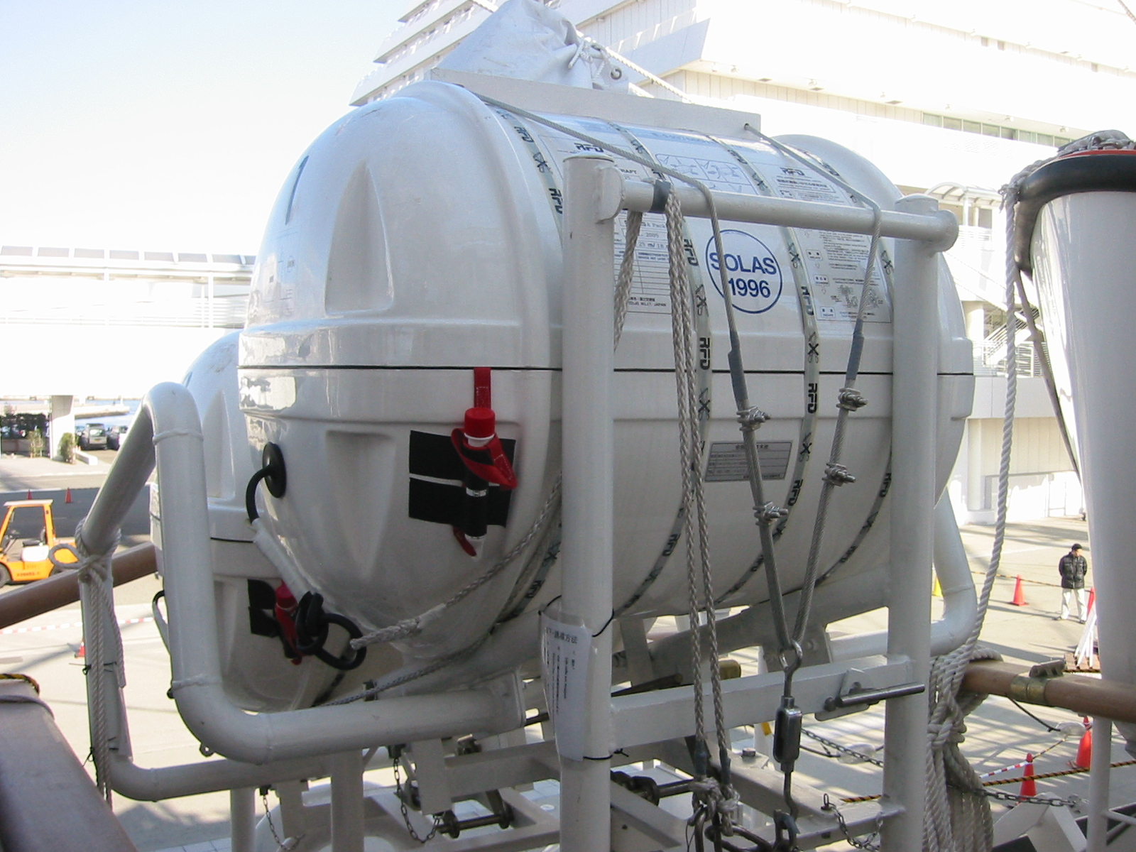 海王丸II世 メリケンパーク中突堤にて